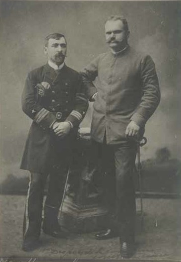 Arturo Fernández Vial y Emilio Körner Henze